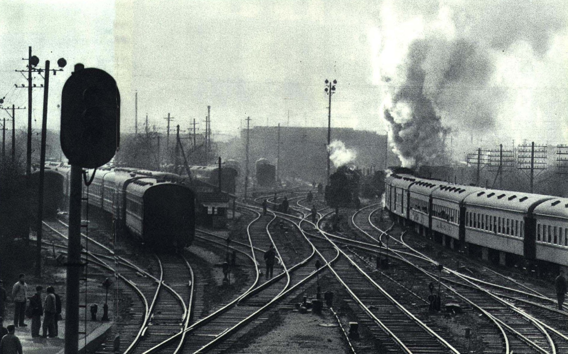 1967-04 1967年上海火车站